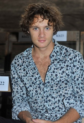 Théo Frilet, assistant à un défilé Kenzo.